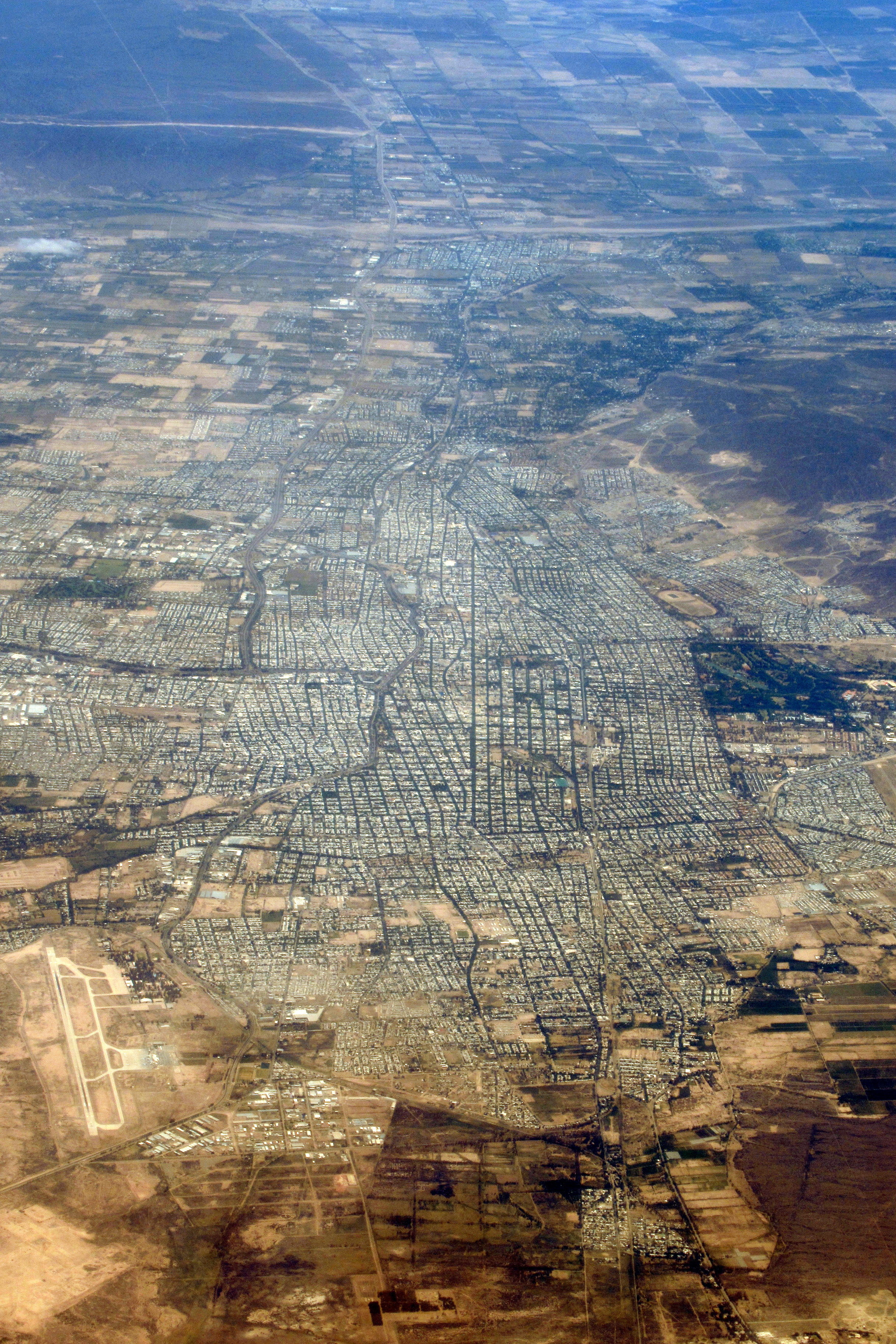 Mendoza (770 m s.n.m., distancia hasta la plaza 31 km aprox., altitud de vuelo 11600 m s.n.m.).